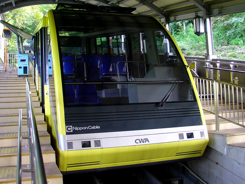 Hobashira Cable funicular. 帆柱ケーブル